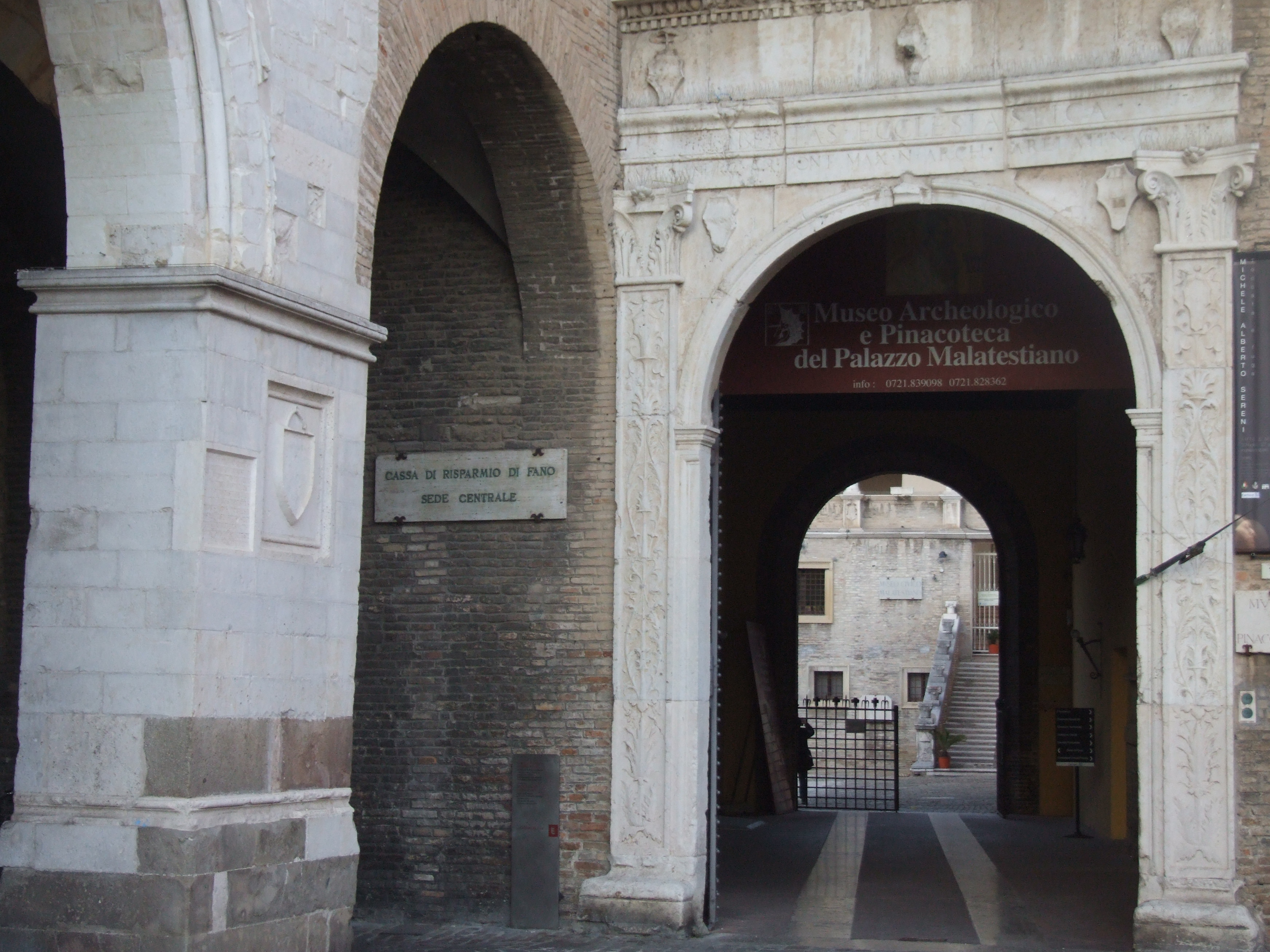 Palazzo Malatestiano This is a photo of a monument which is part of cultural heritage of Italy.